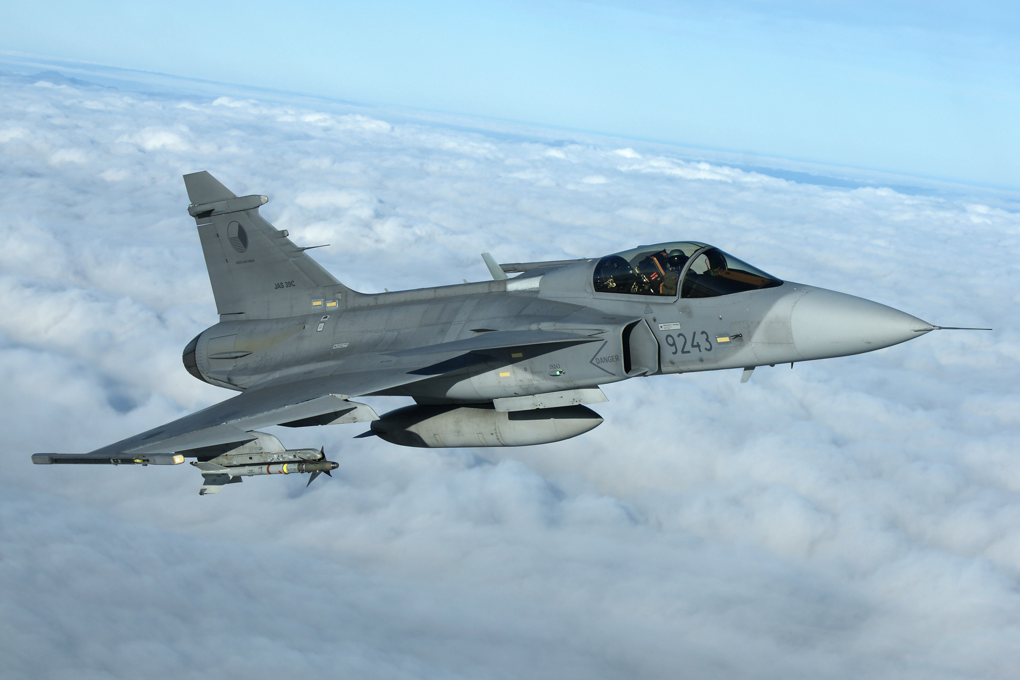 Saab JAS-39 Gripen (Czech Air Force)